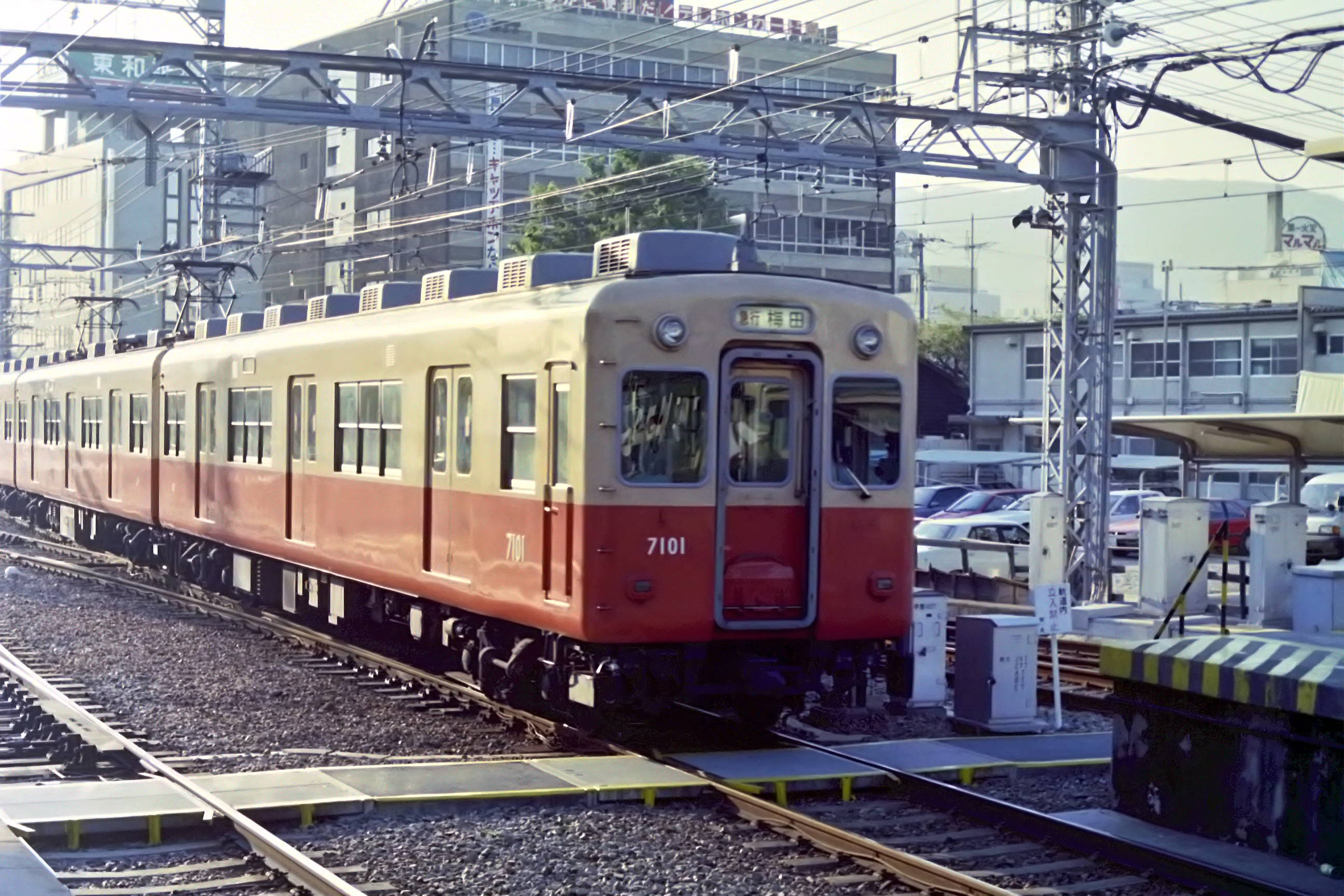 阪神電気鉄道7101 1987年 西宮駅